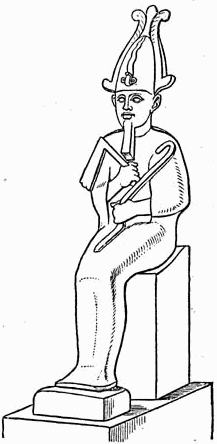 Osiris sitzend, mit stilisiertem Dreschflegel